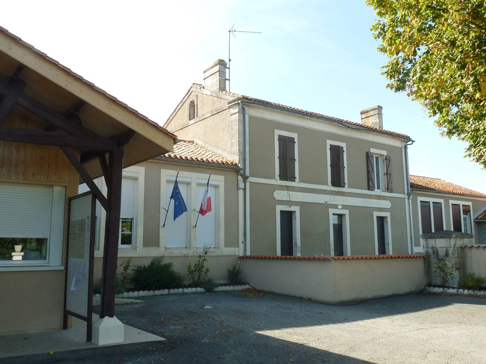 mairie de Bellon (16), France